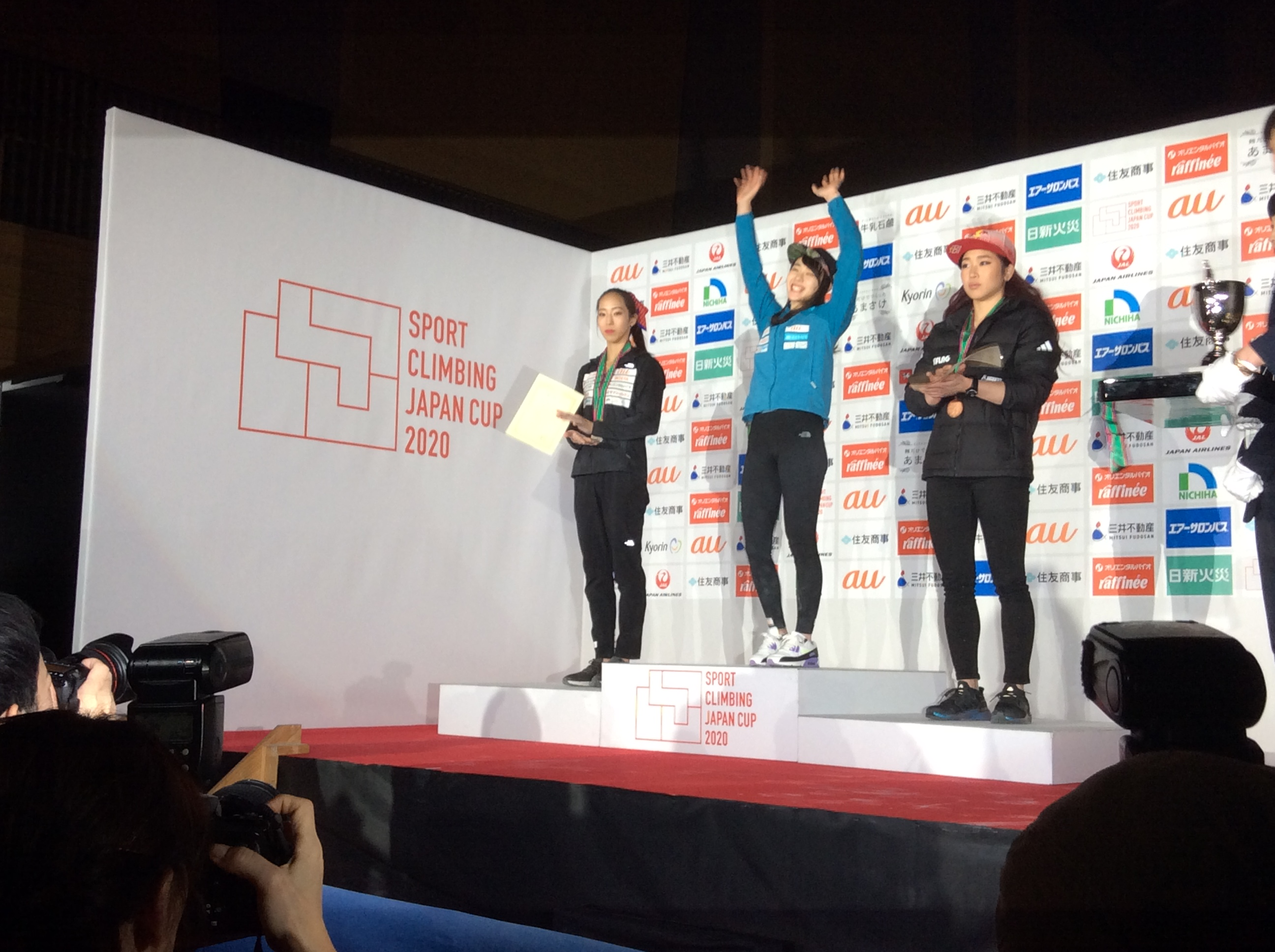 ボルダリング・ジャパンカップ 伊藤 ふたば